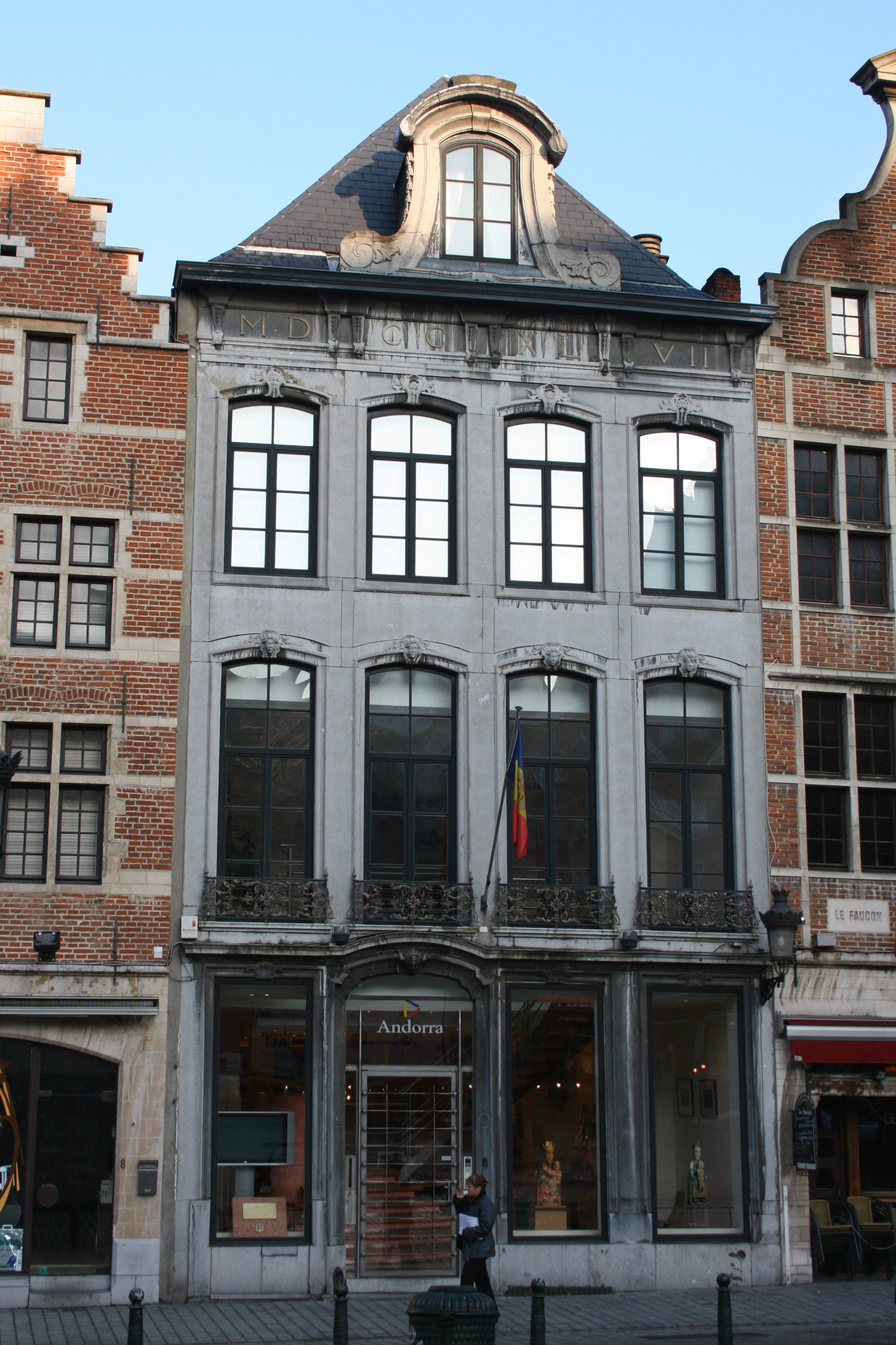 Rue de la Montagne 10, Bruxelles (Belgique)